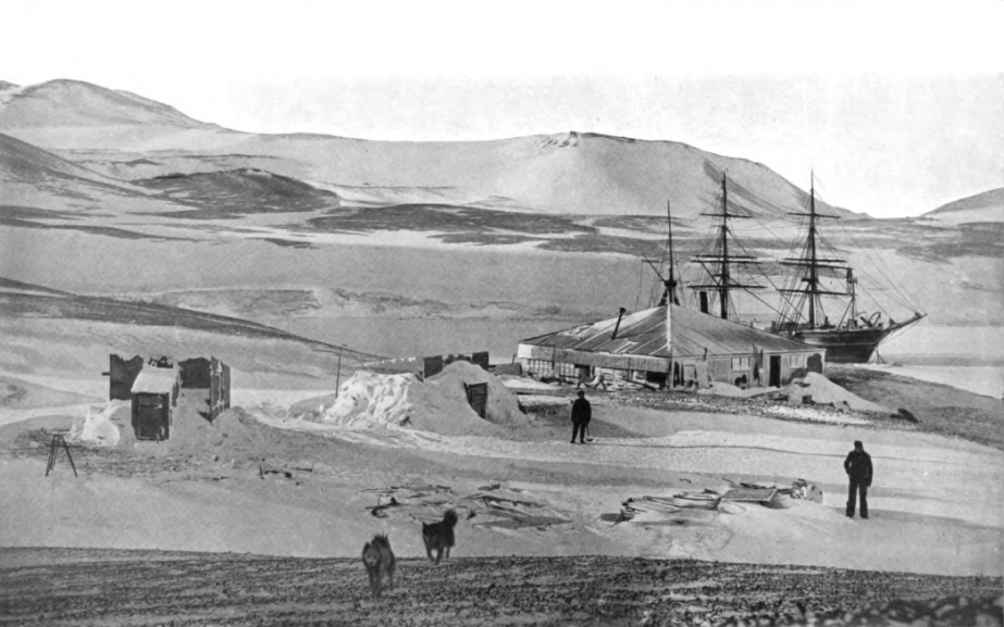 Campamento de la expdición Discovery